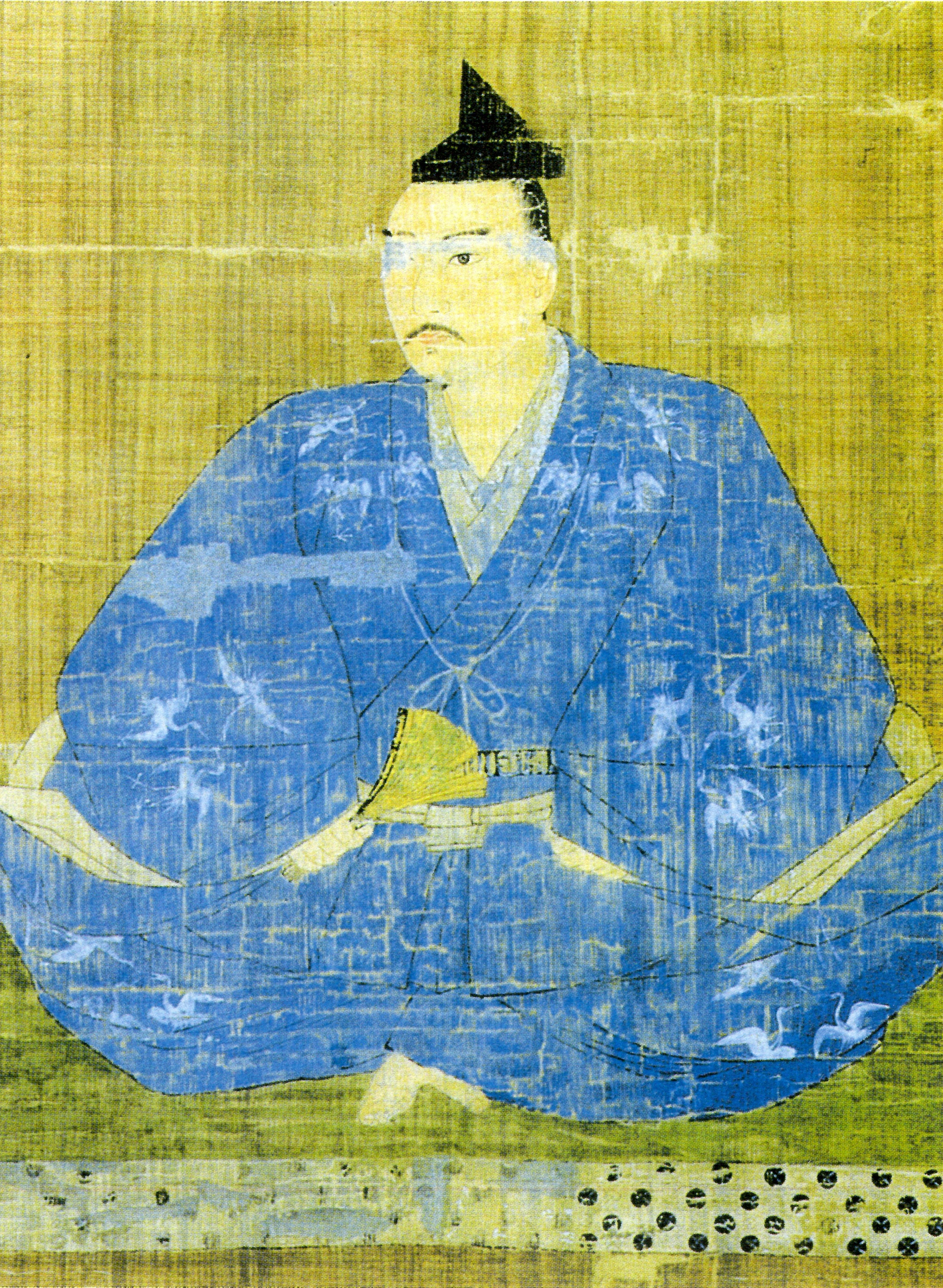 大友親著の肖像。